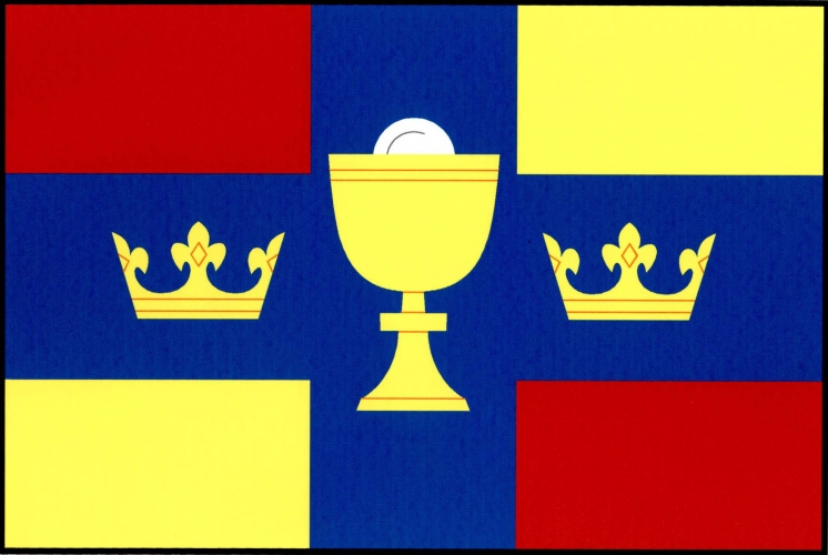 Vlajka, Křenov, okres Svitavy